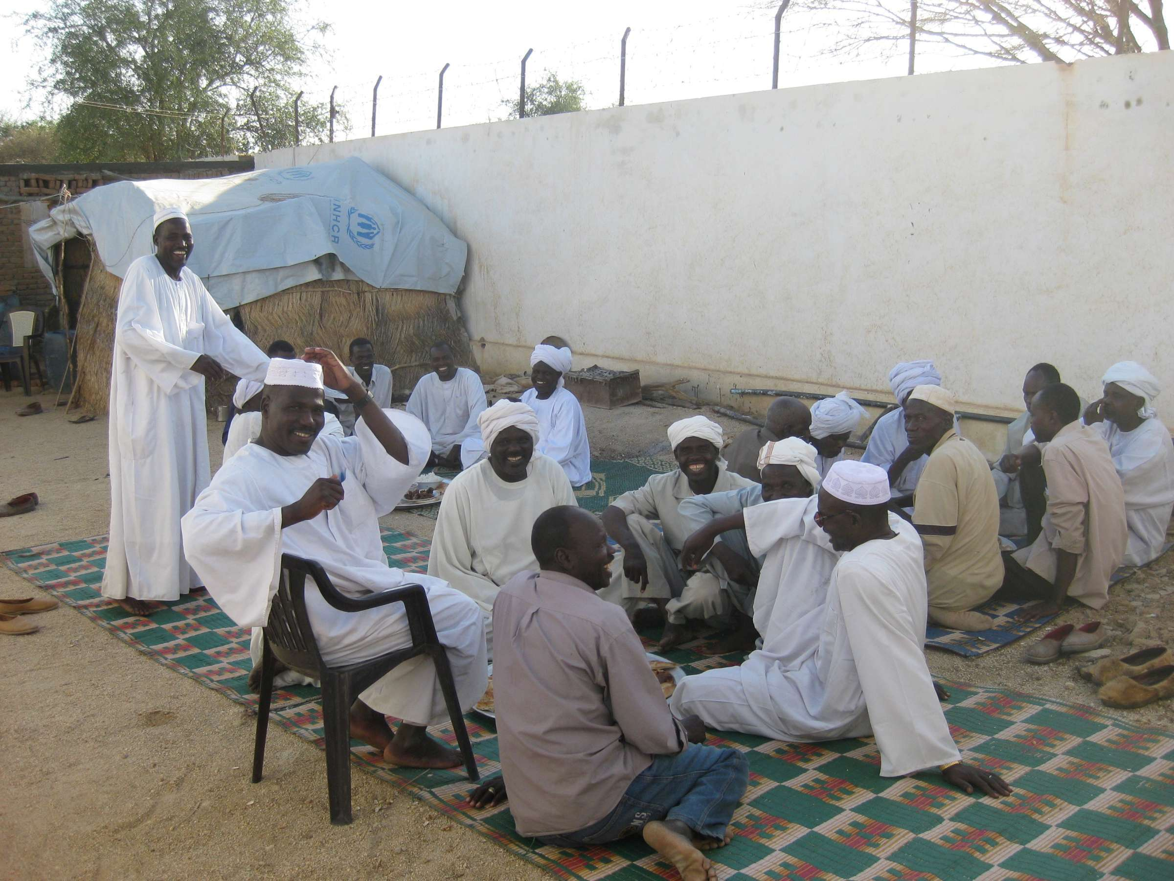 Darfur